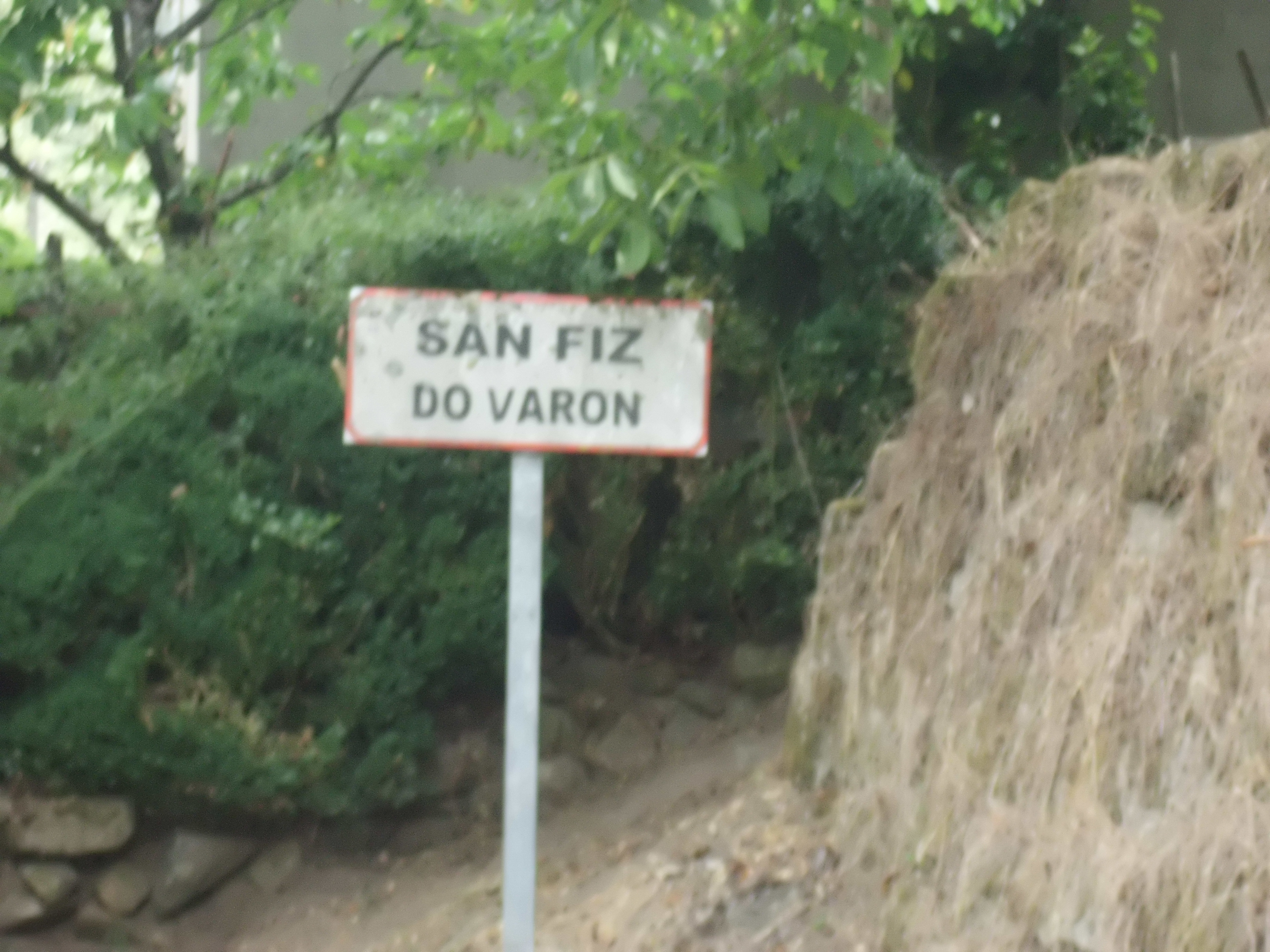 Cartel indicativo de la llegada a la aldea